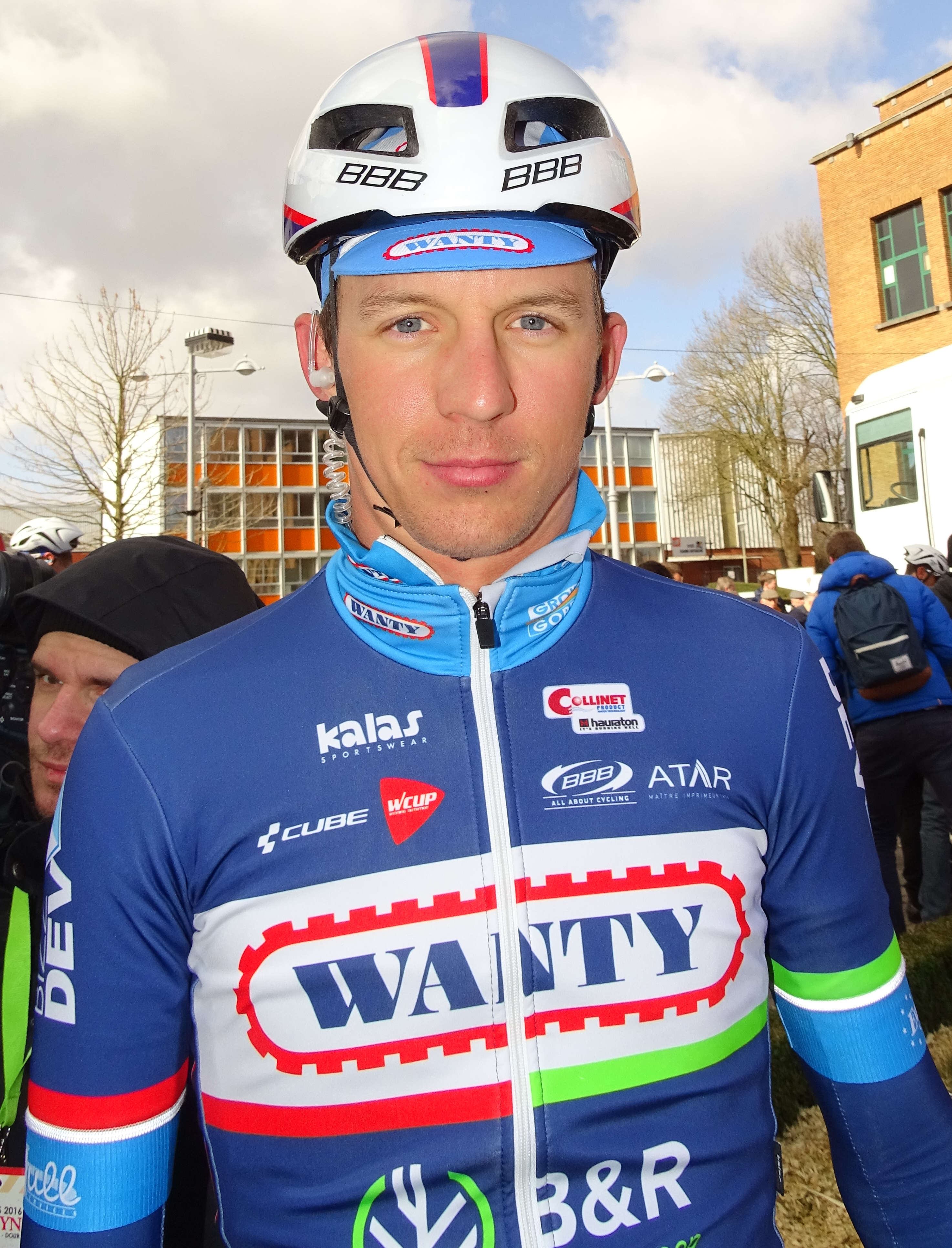 Reportage réalisé le mercredi 2 mars à l'occasion du départ du Samyn des Dames 2016 et du Samyn 2016 à Quaregnon, Belgique.